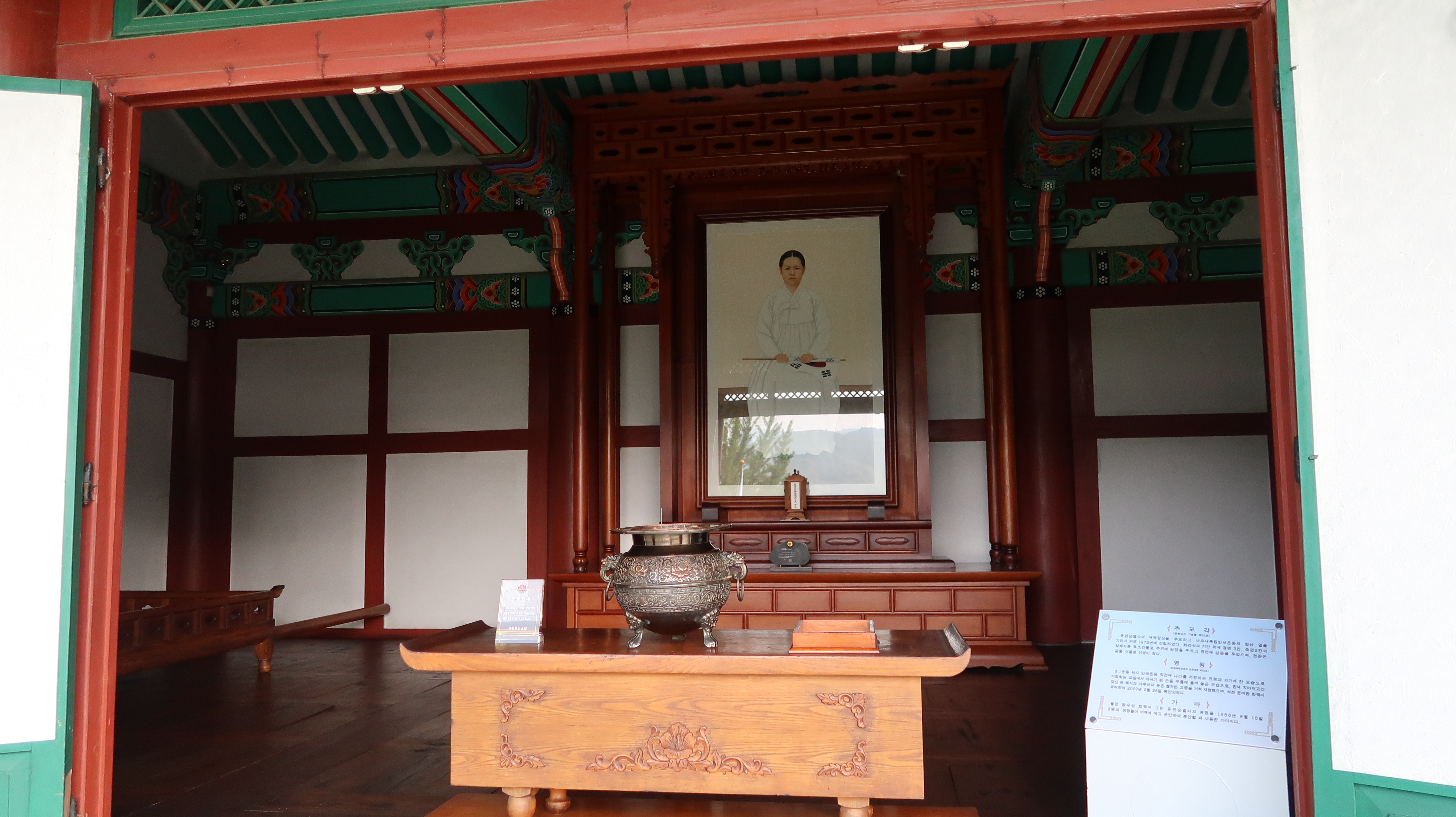 유관순열사-유적-The-Relics-of-Patriot-Yu-Gwansun